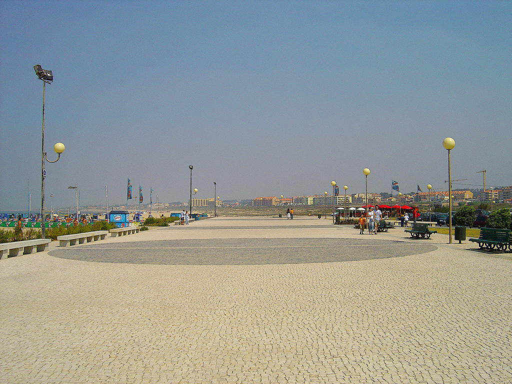 Praia de Mar Belo, Espinho